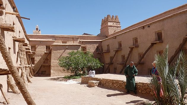 Speicherburg in Südmarokko